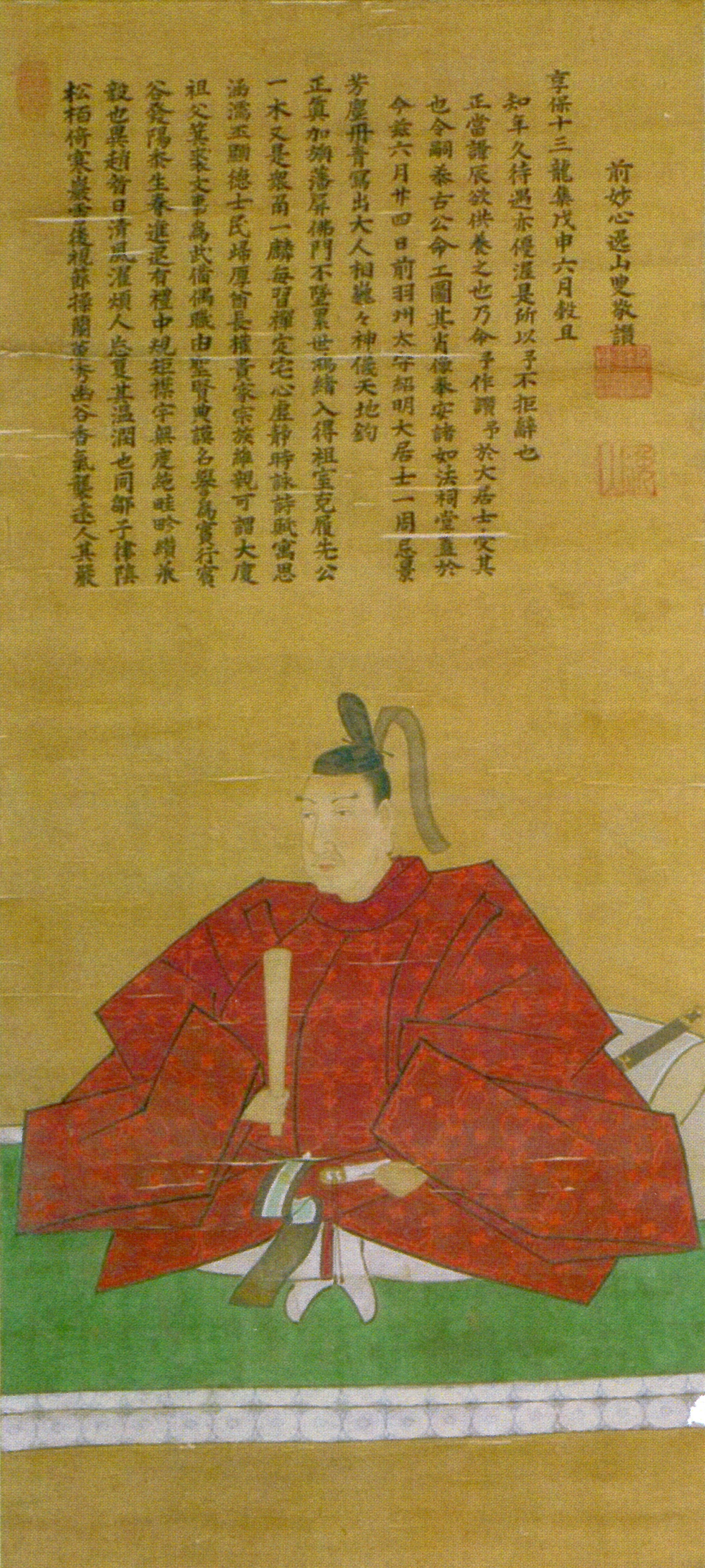 加藤泰統の肖像。